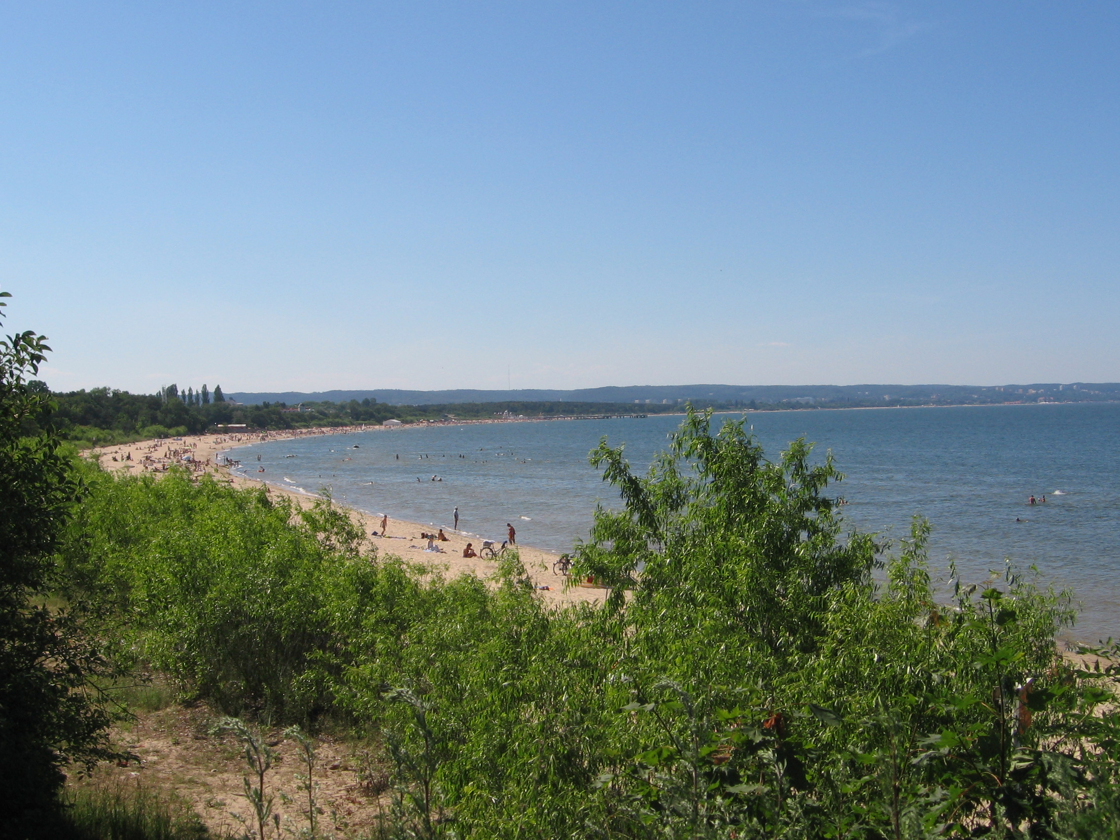 View on Gdańsk Bay/ Uitzicht op de baai van Gdansk